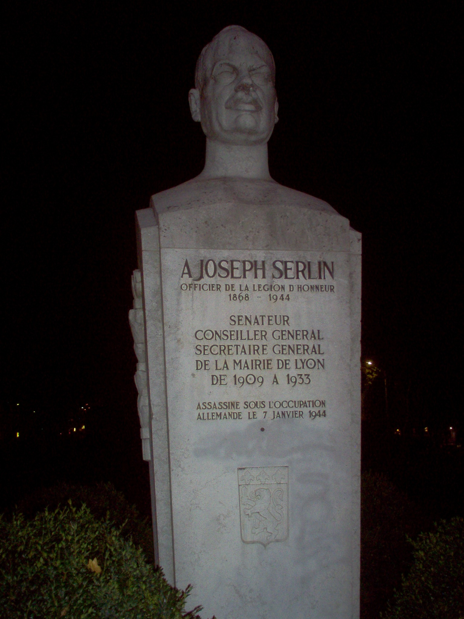 monument à la mémoire de Joseph Serlin (F-69006, Lyon)